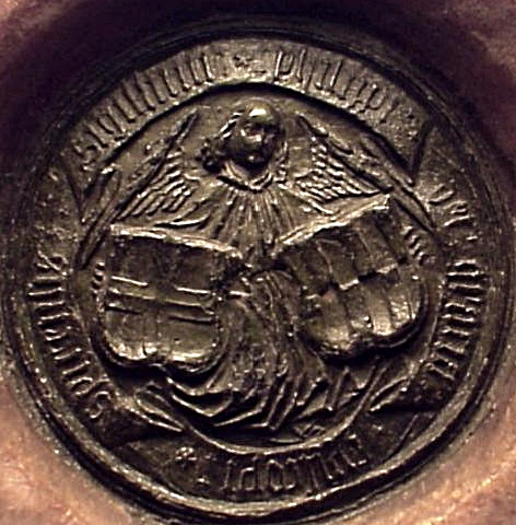 Bischof Philipp von Rosenberg, Speyer, Siegelabdruck